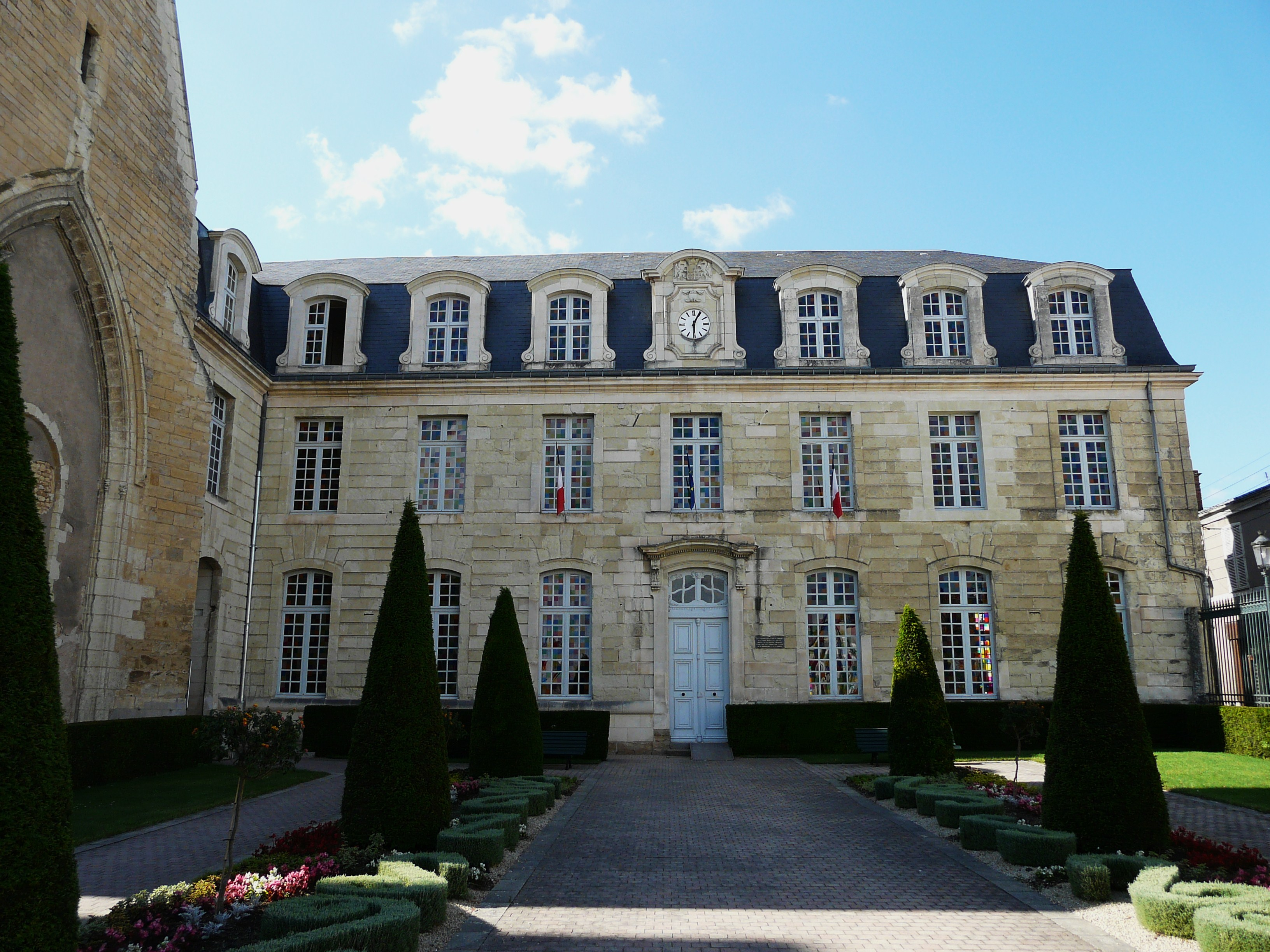 Hôtel de ville (ancienne abbaye) de Thouars, Deux-Sèvres, France